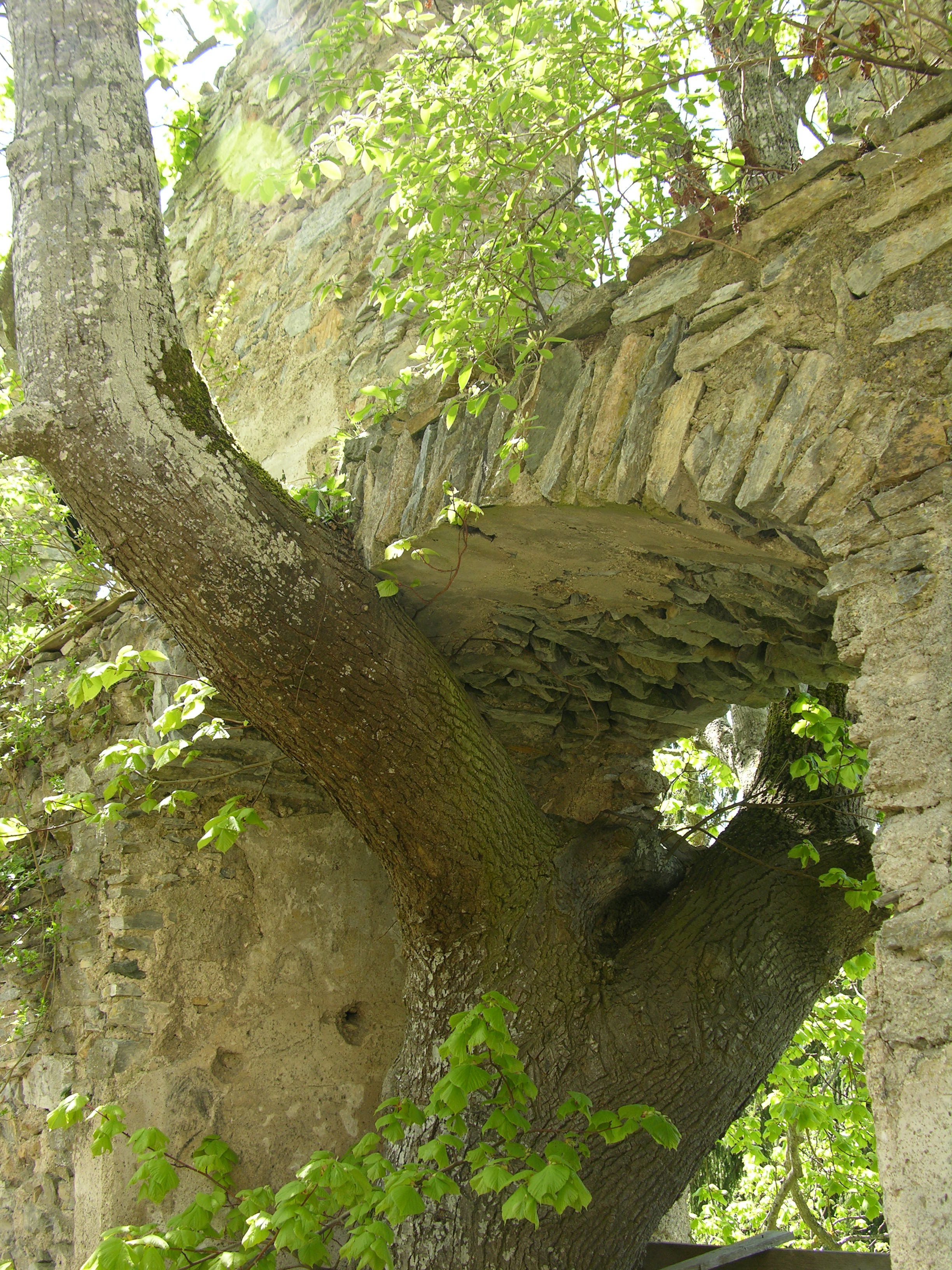 Wilder Pflanzenwuchs